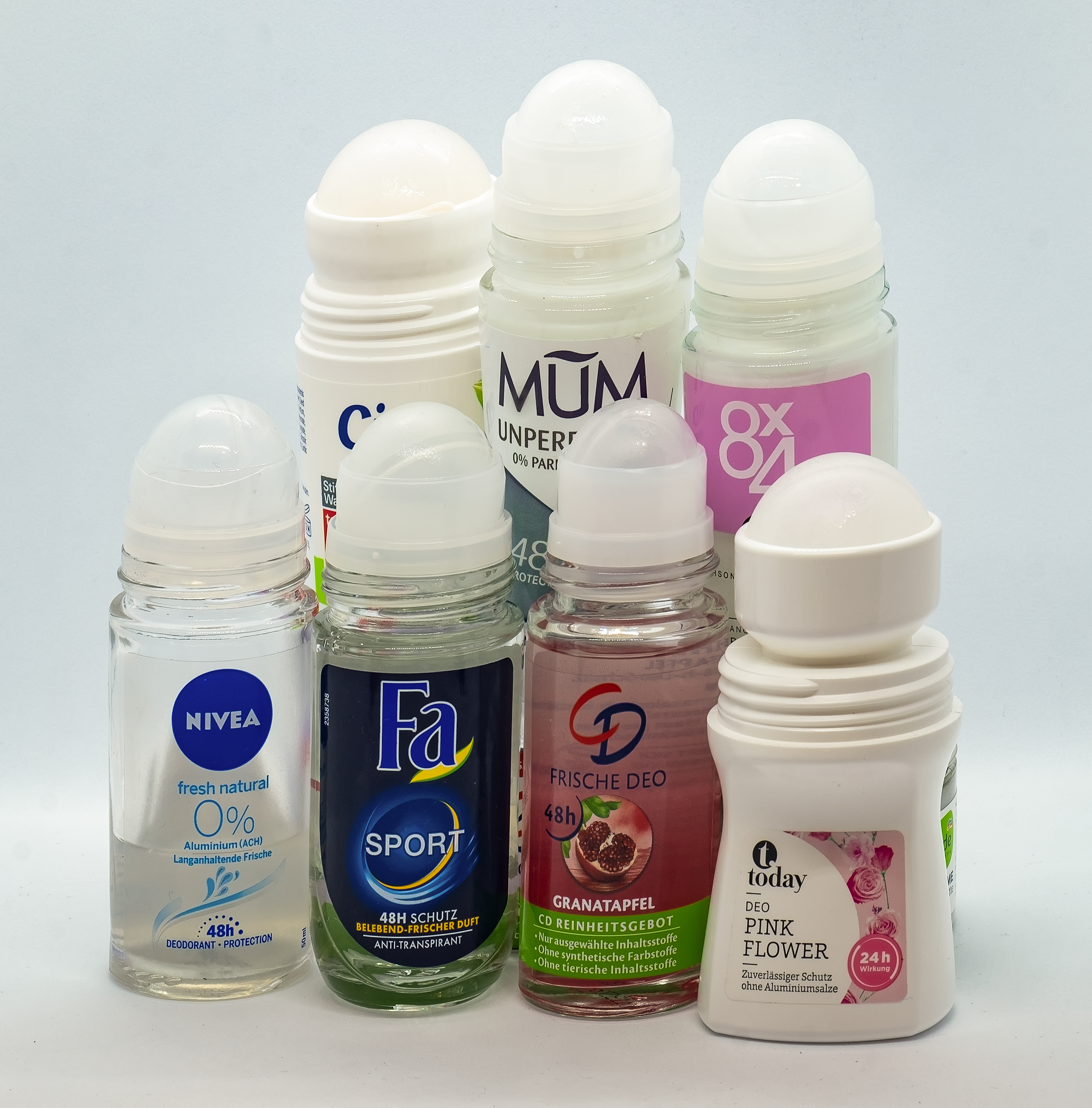 Deoroller